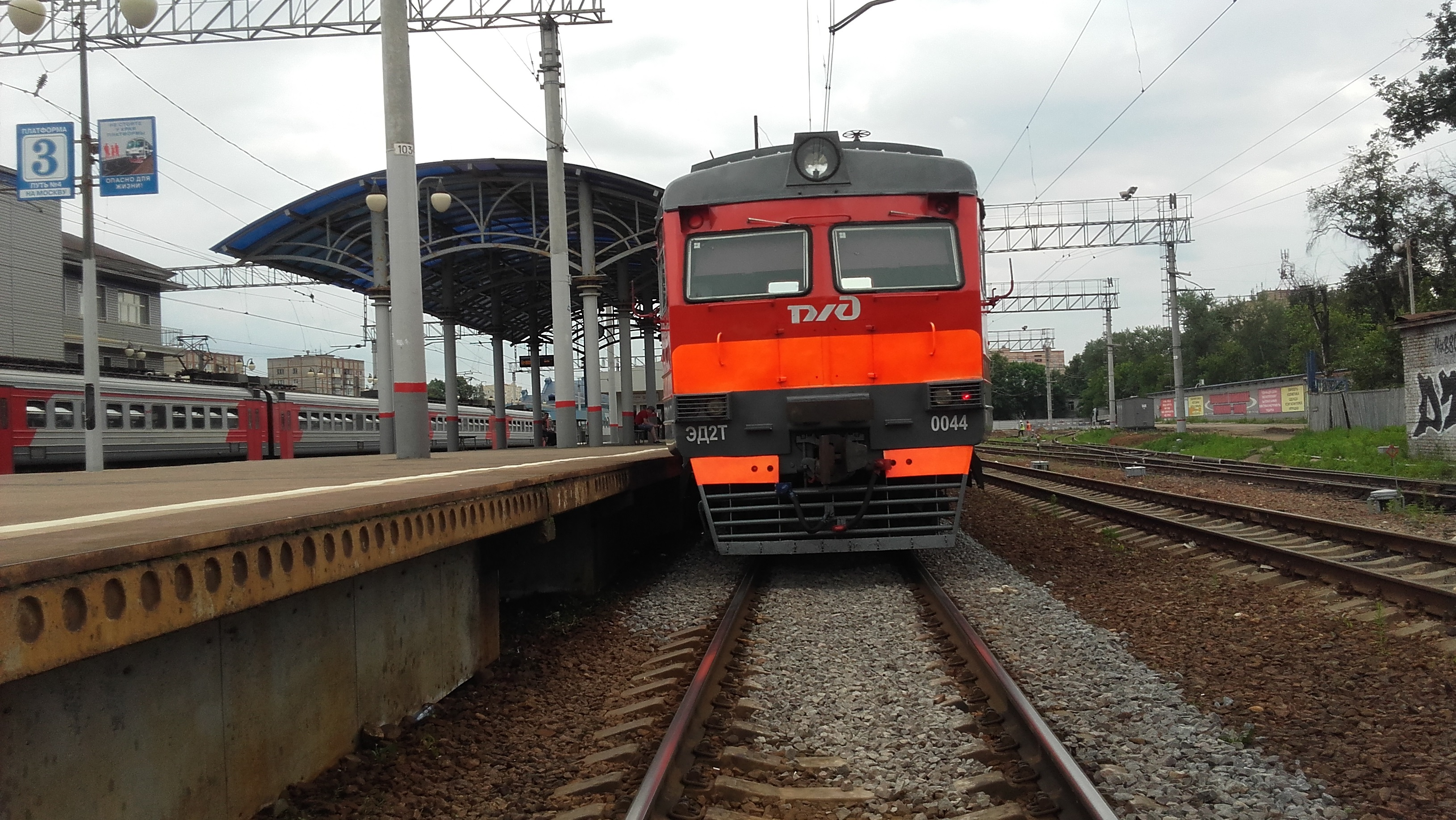 Электропоезд ЭД2Т-0044 на станции Пушкино маршрутом Александров - Москва